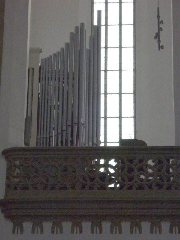 Marienorgel der Basilika St. Ulrich und Afra, Augsburg